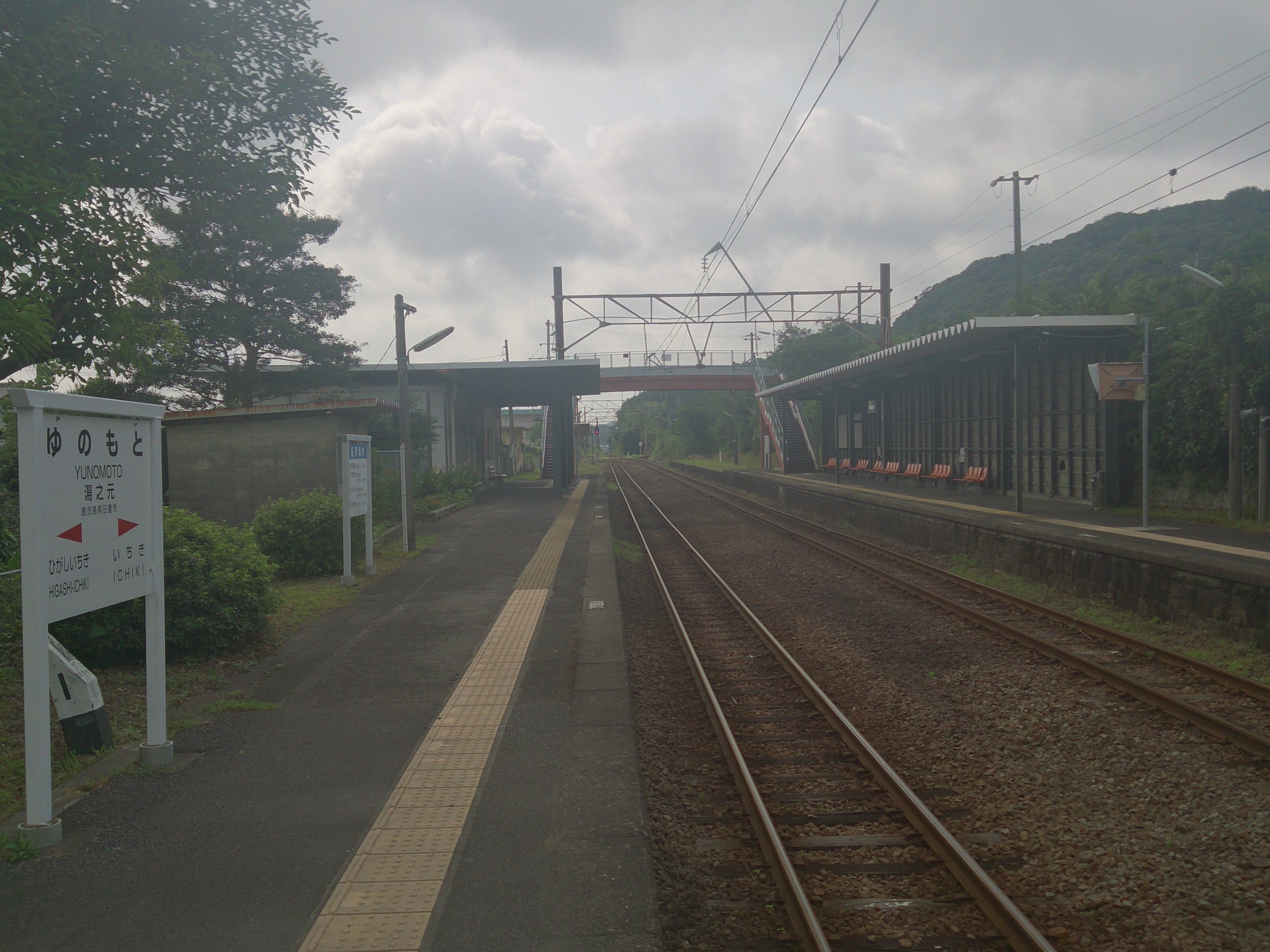 湯之元駅ホーム